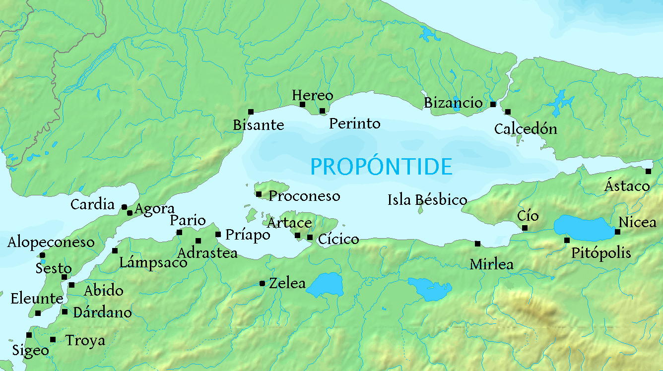 Mapa con algunas de las principales colonias griegas de la Propóntide.